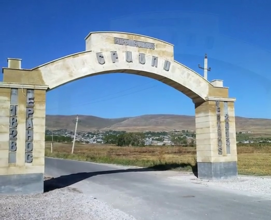 Երանոս